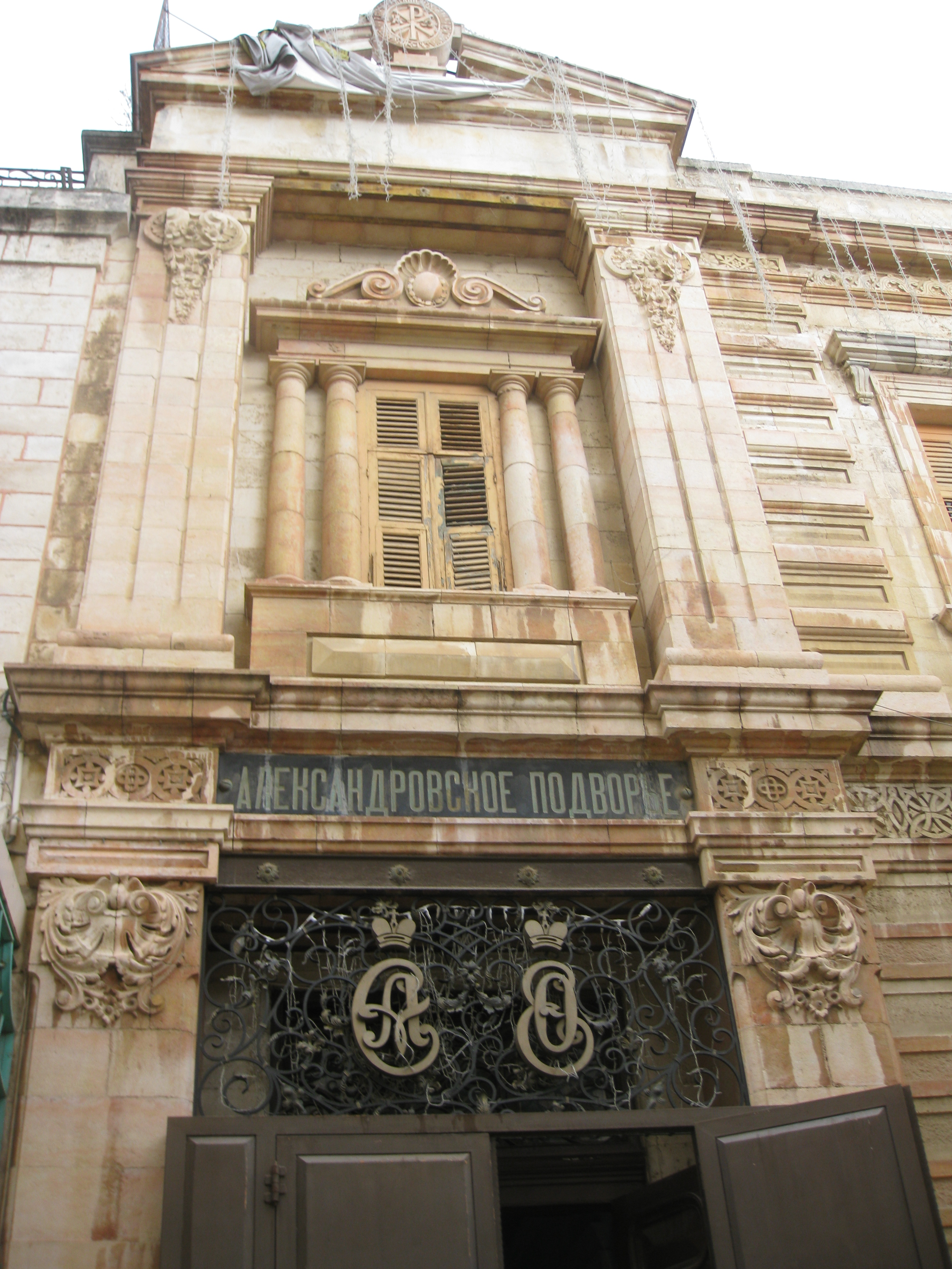 The Christian Quarter - The Russion Church הרובע הנוצרי בעיר העתיקה של ירושלים הכנסייה הרוסית